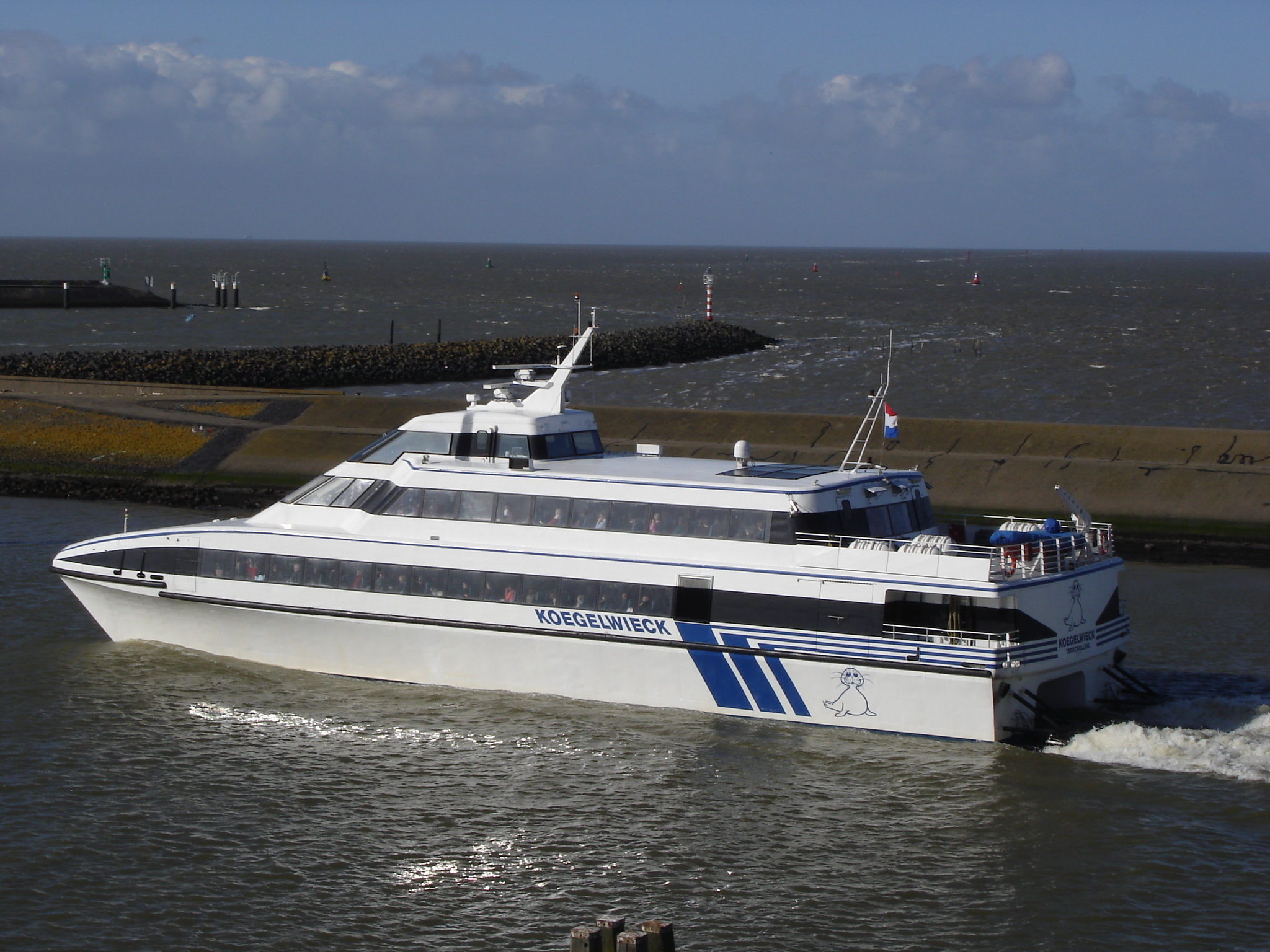 Koegelwieck in een zonnige Harlinger haven